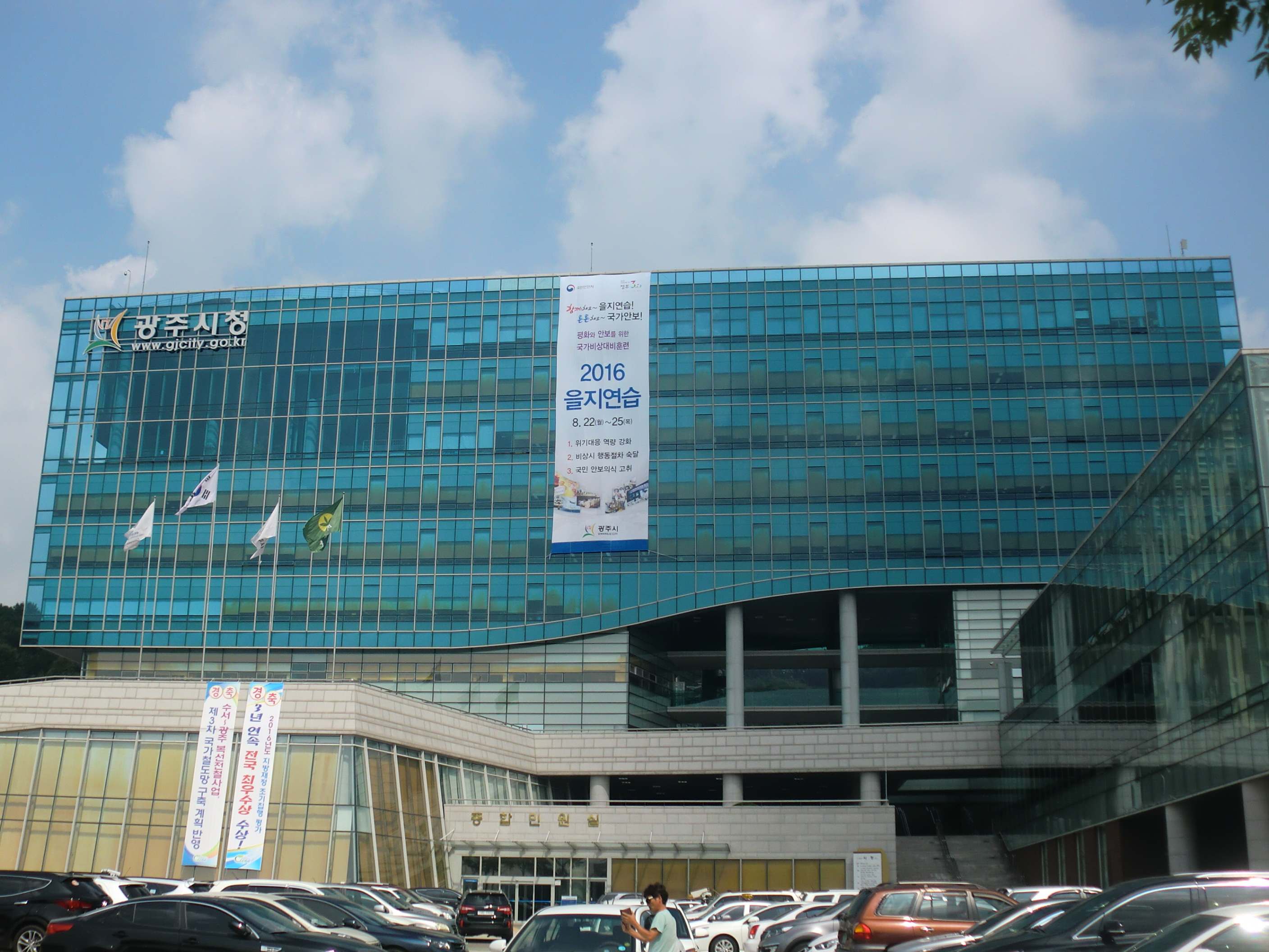 경기도 광주시에 있는 광주시청